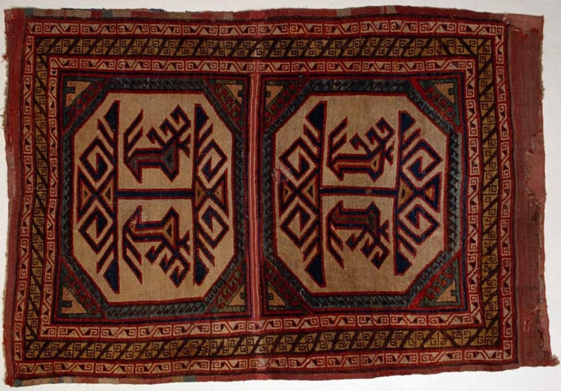 Marbymattan. Statens historiska museum, inventarienummer 17786.